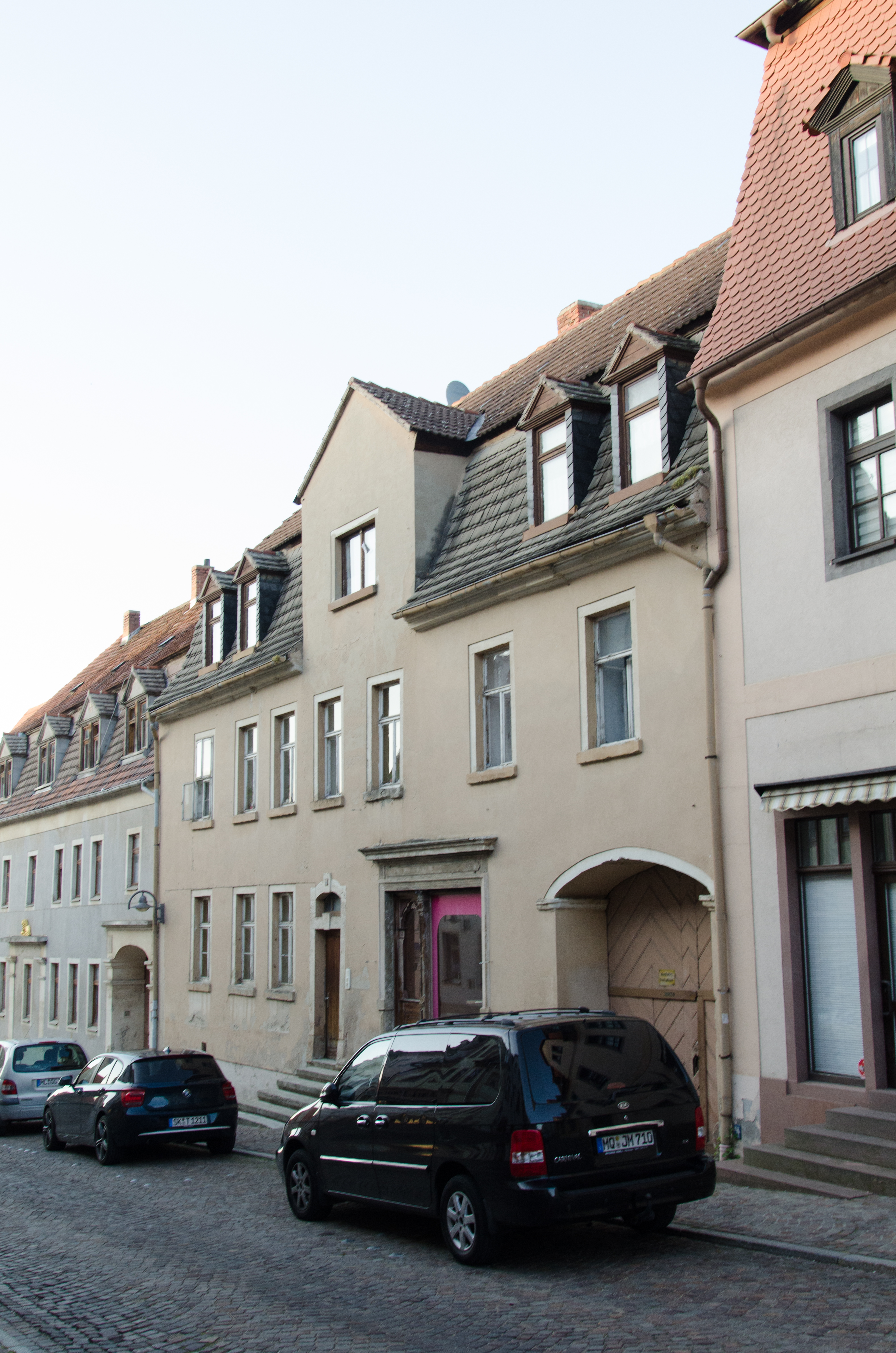 Querfurt, Nebraer Straße 3